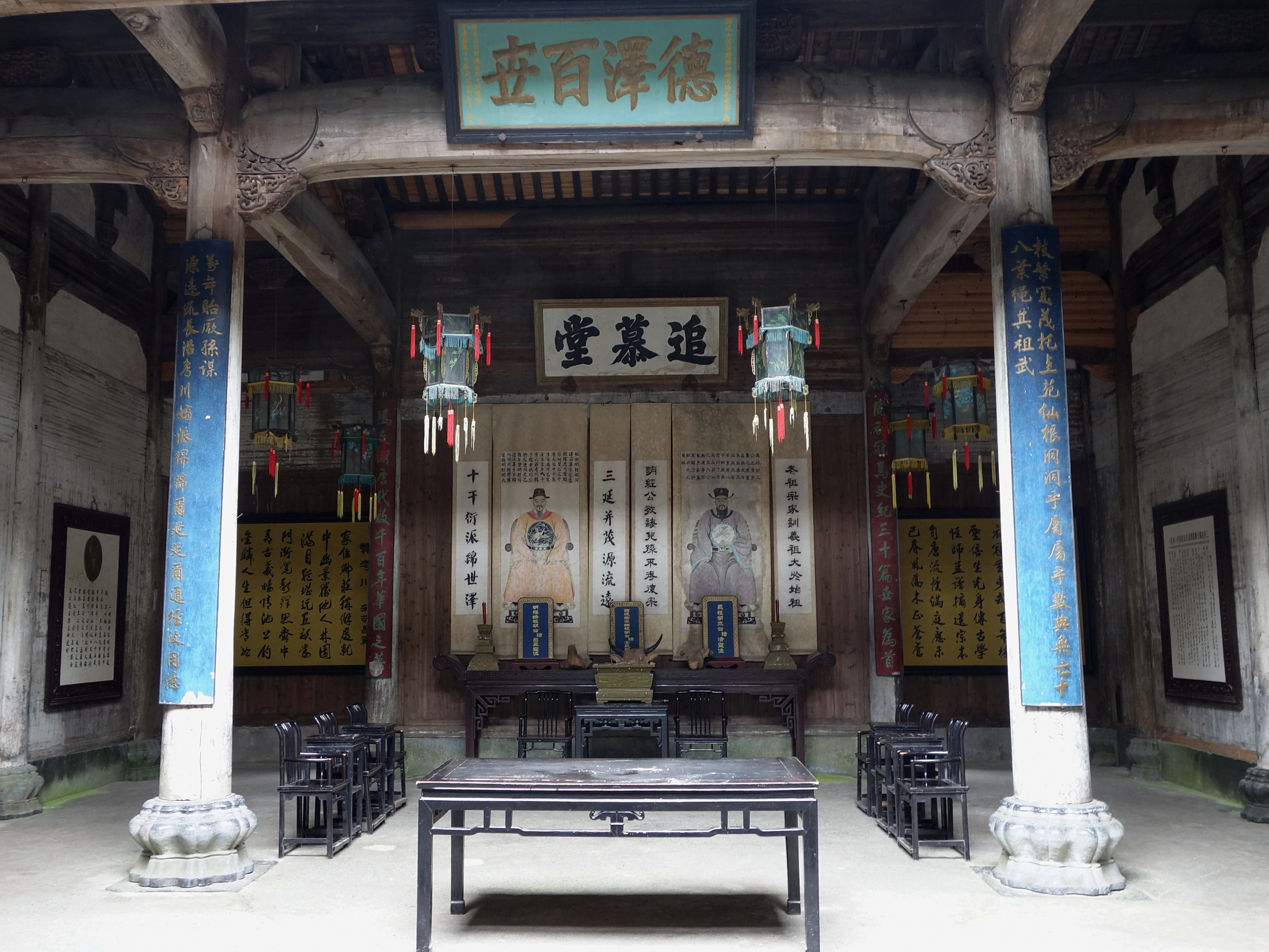 西递的祠堂——追慕堂，建于清朝乾隆年间。